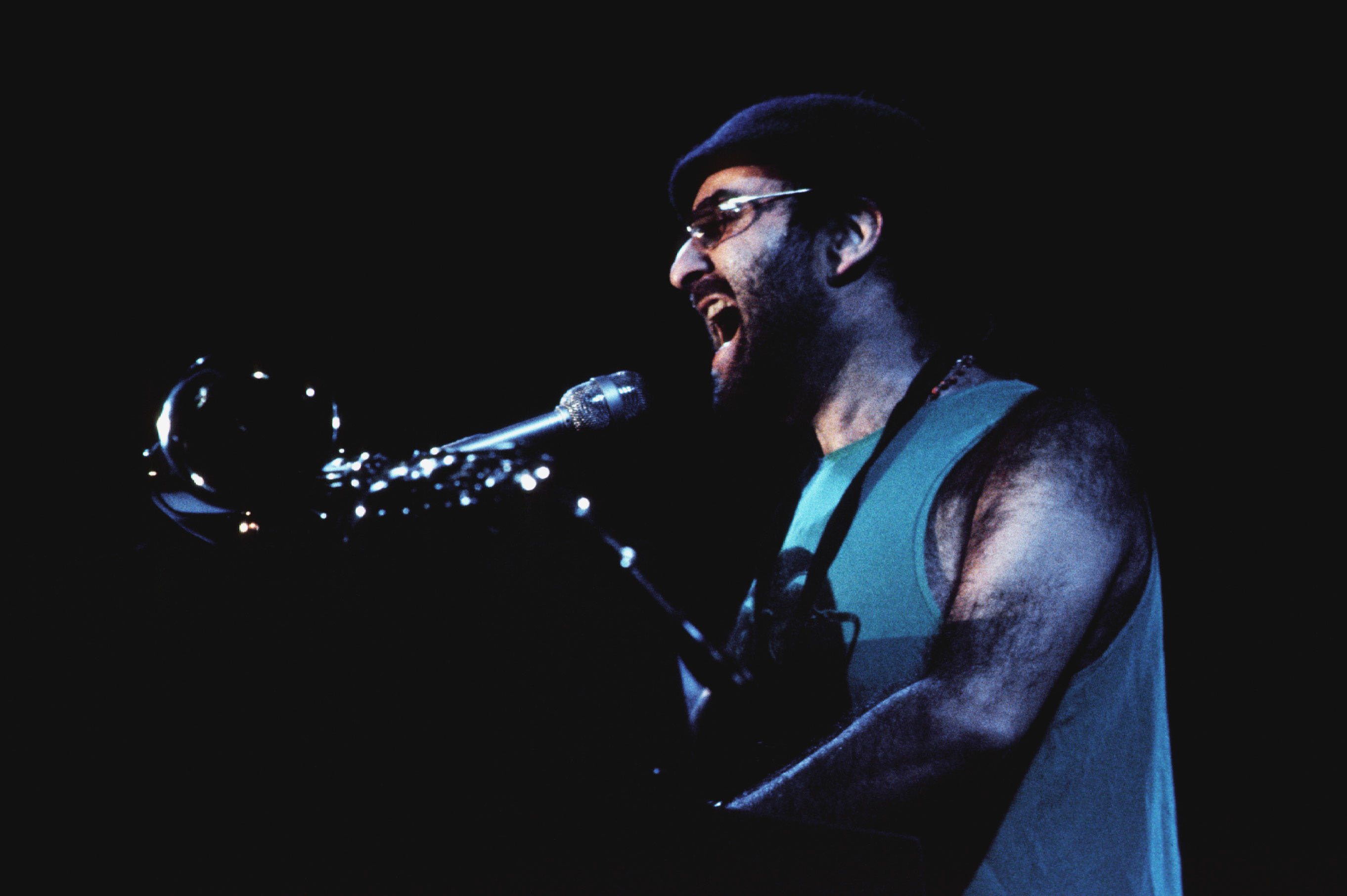 negli anni '80